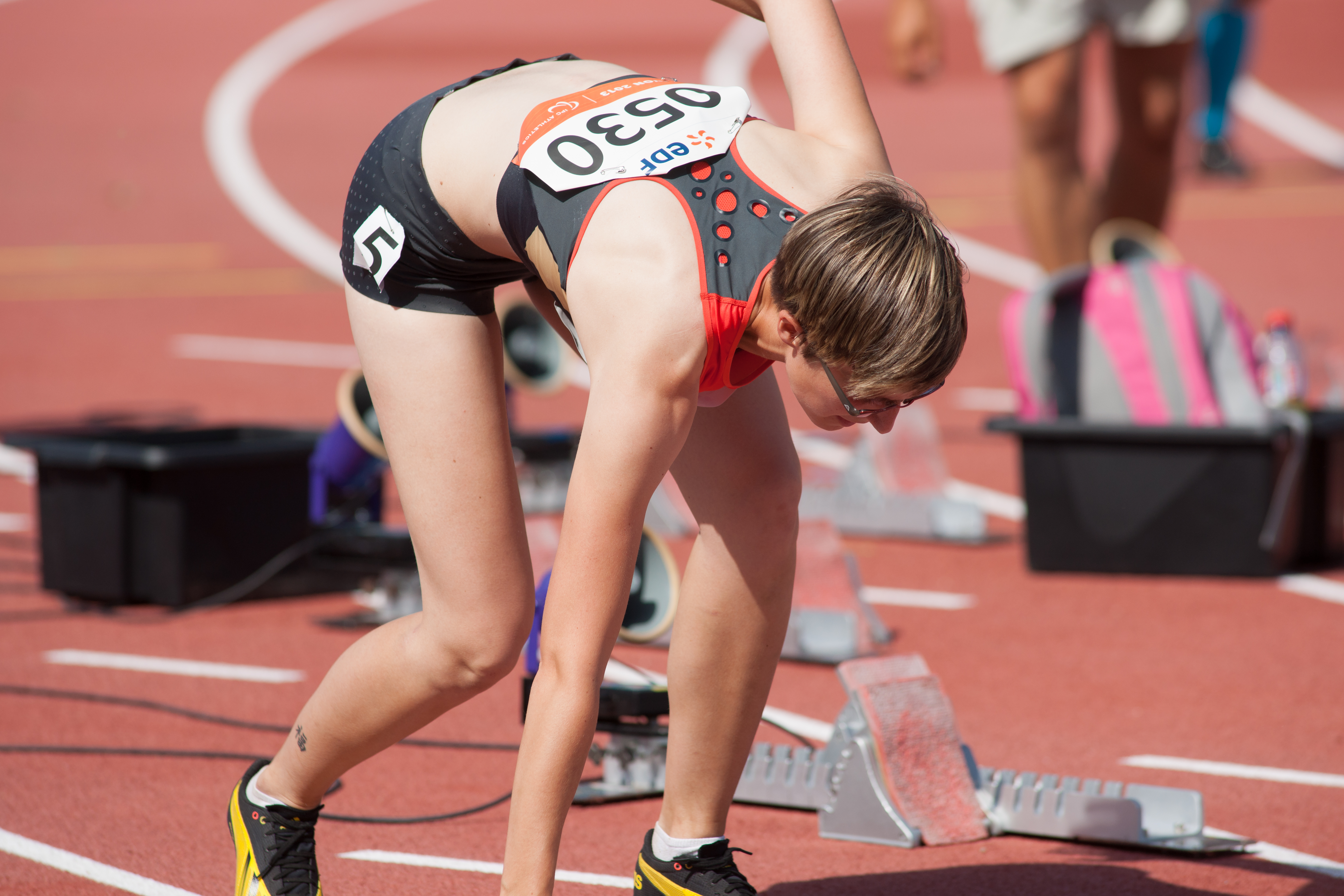 Championnats du monde d'athlétisme IPC 2013. 100 mètres féminin T36.